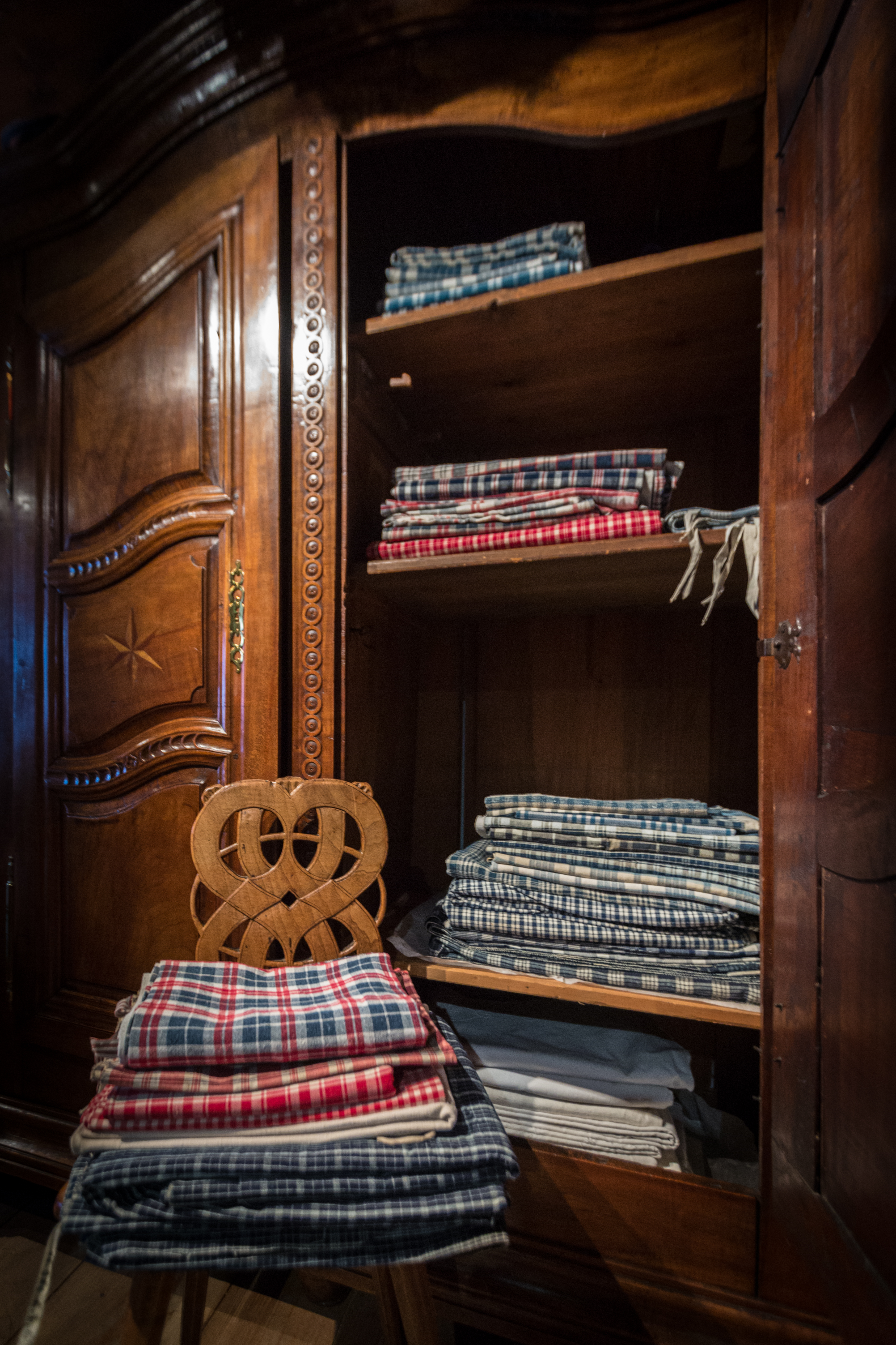 Collection de kelsch du Musée alsacien de Strasbourg. Piles de kelsch dans une armoire de mariage à décor marqueté et sculpté du début du XIXe siècle, provenant d'Alsace Bossue.